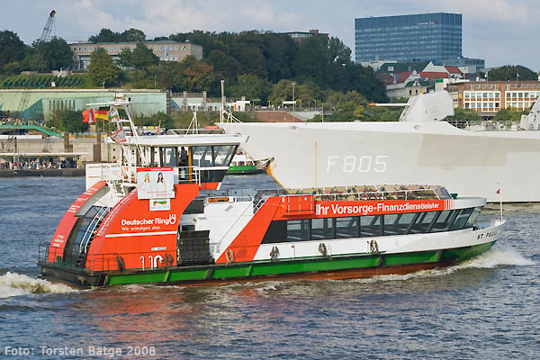 Die HADAG-Fähre MS St. Pauli fährt zu ihrem Einsatz auf der Hafenfährlinie 62 Sandtorhöft–Landungsbrücken–Finkenwerder.